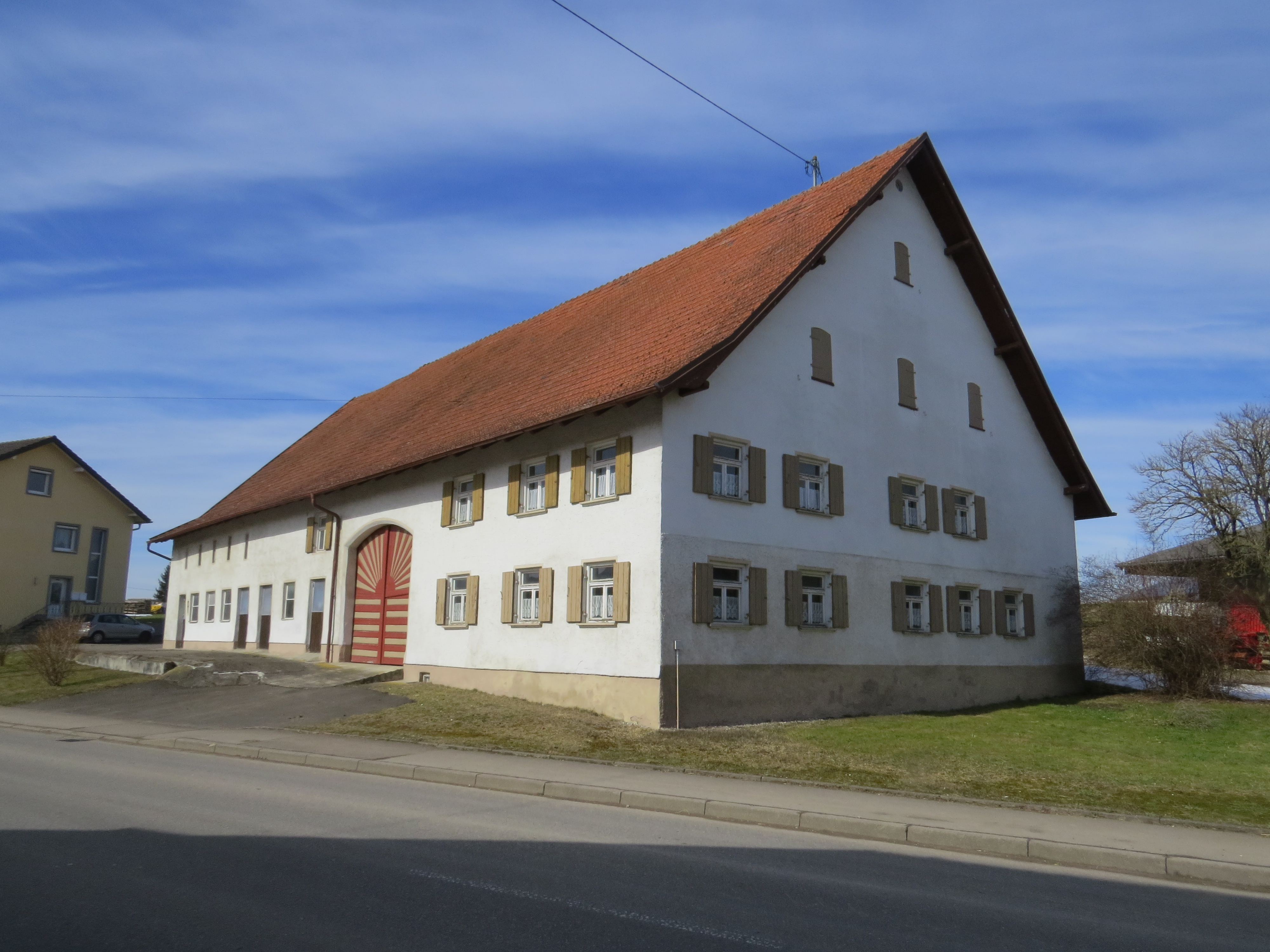 Bauernhof in Hawangen